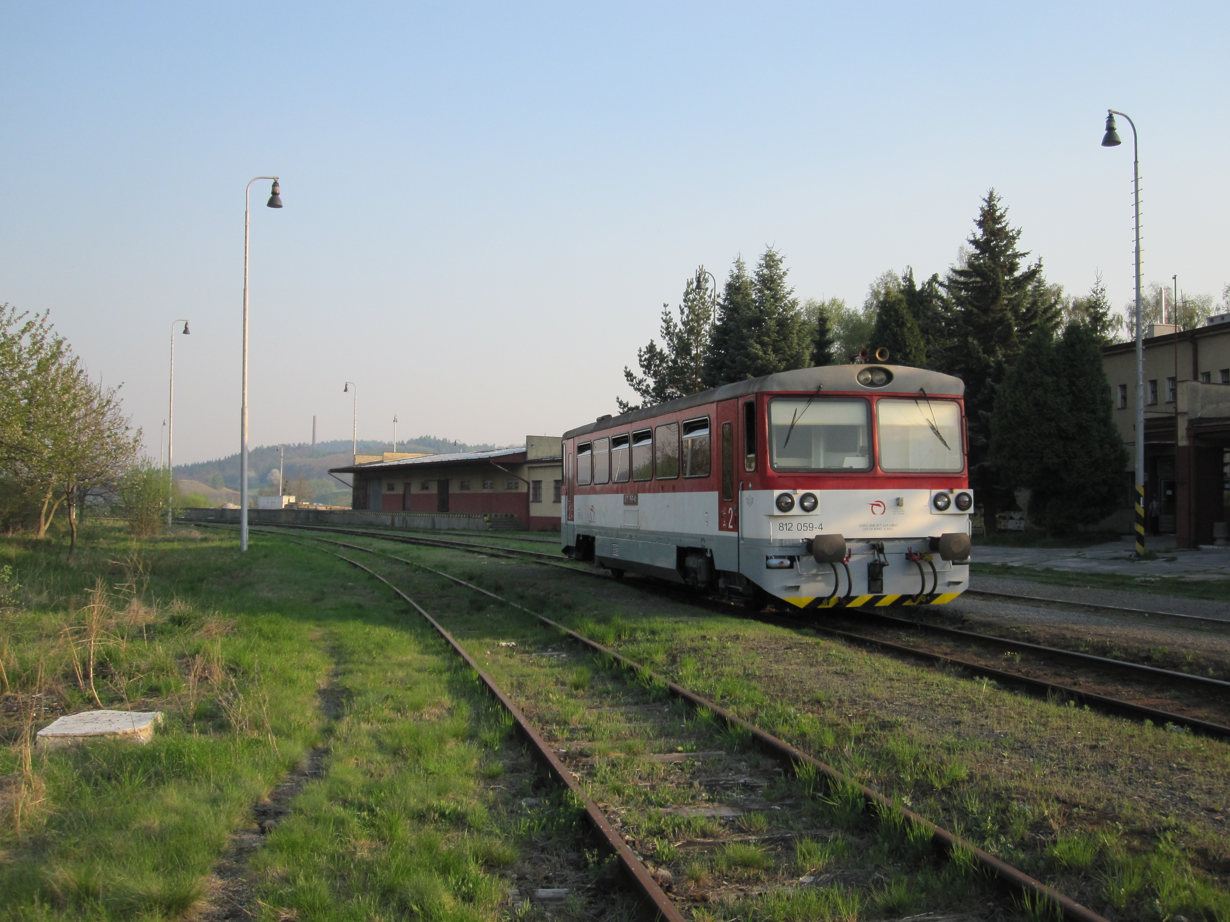 Motorový vůz 812.059 Železniční společnosti Slovensko, Banská Štiavnica